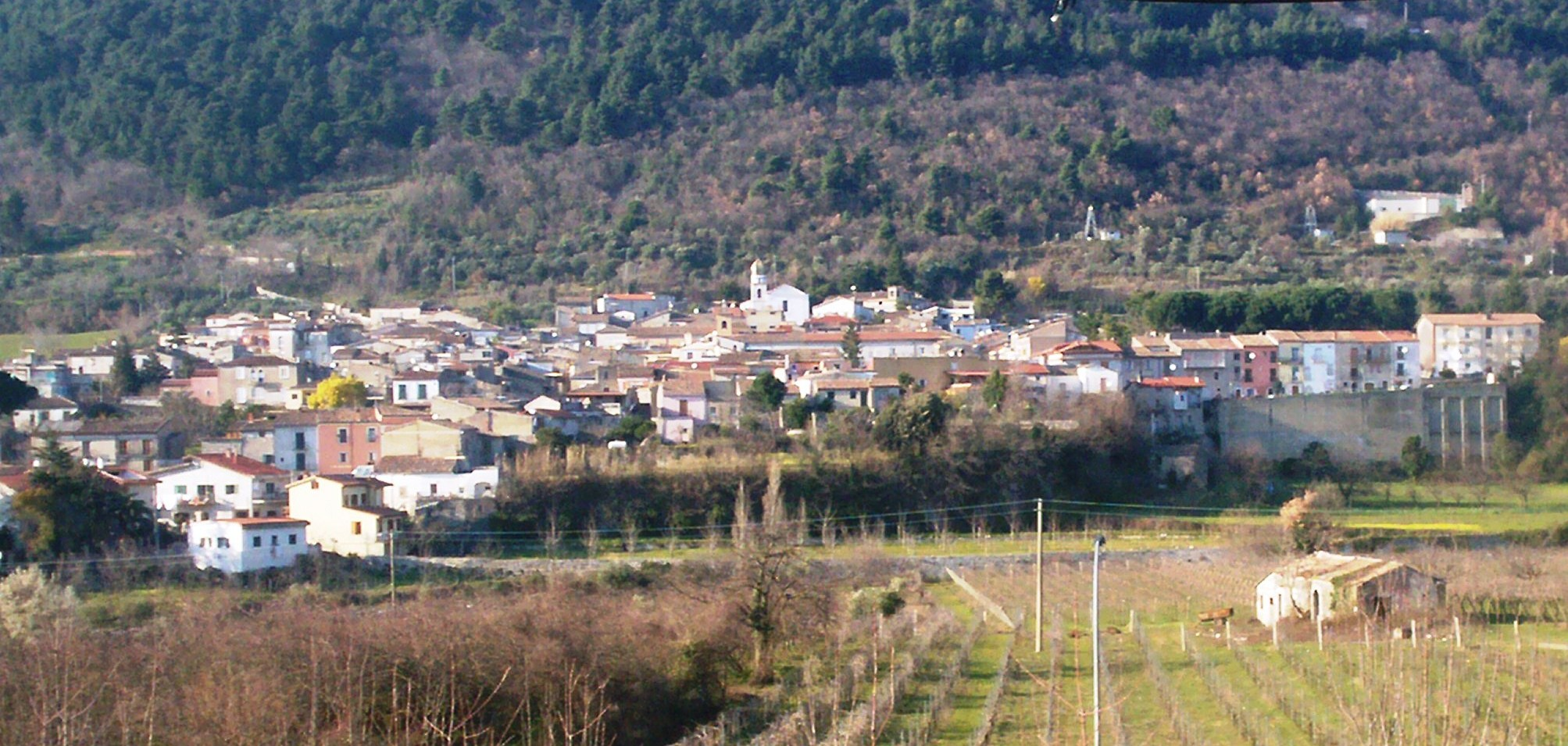 Panorama di San Lorenzello (Bn)